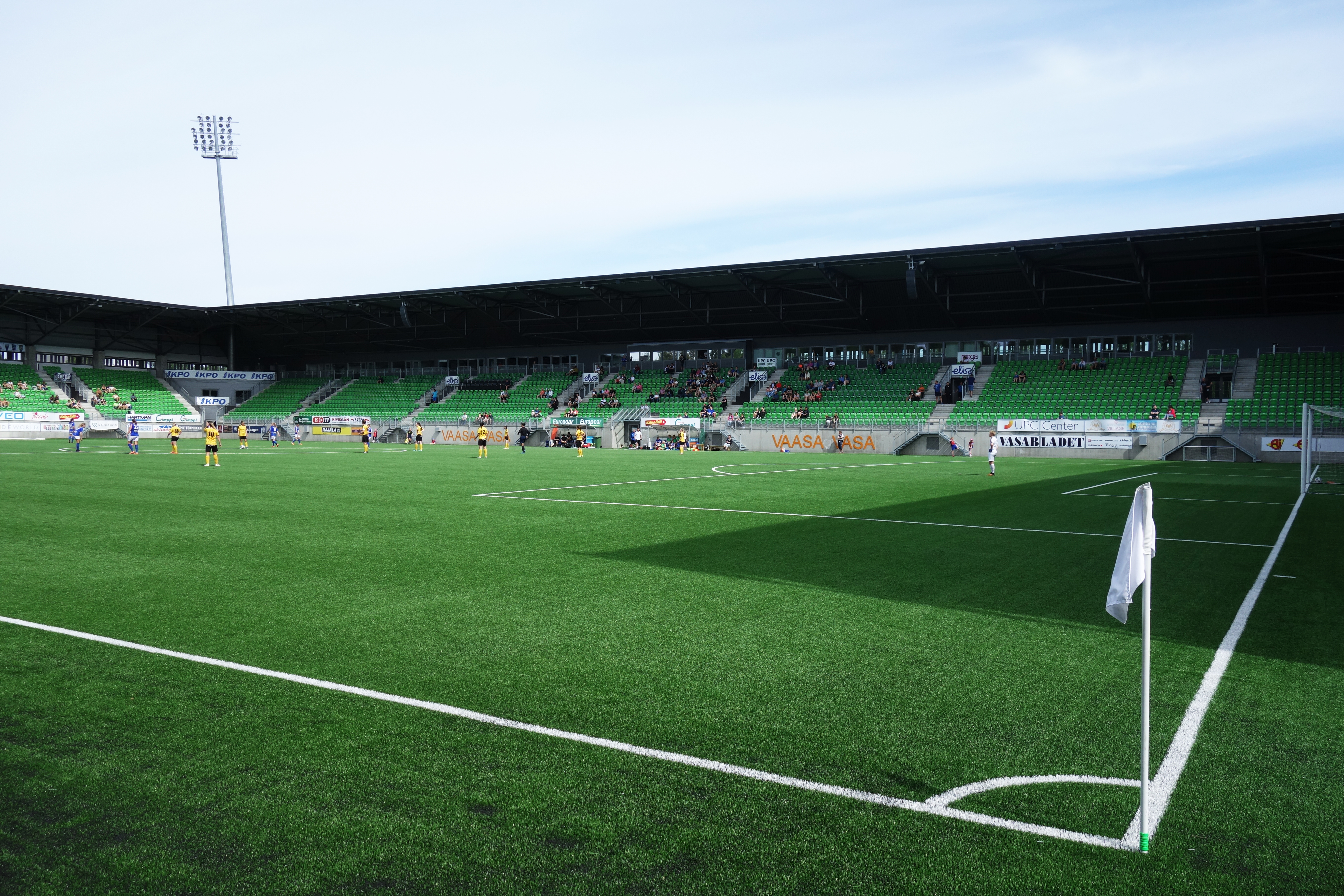 Elisa Stadion 17.6.2017